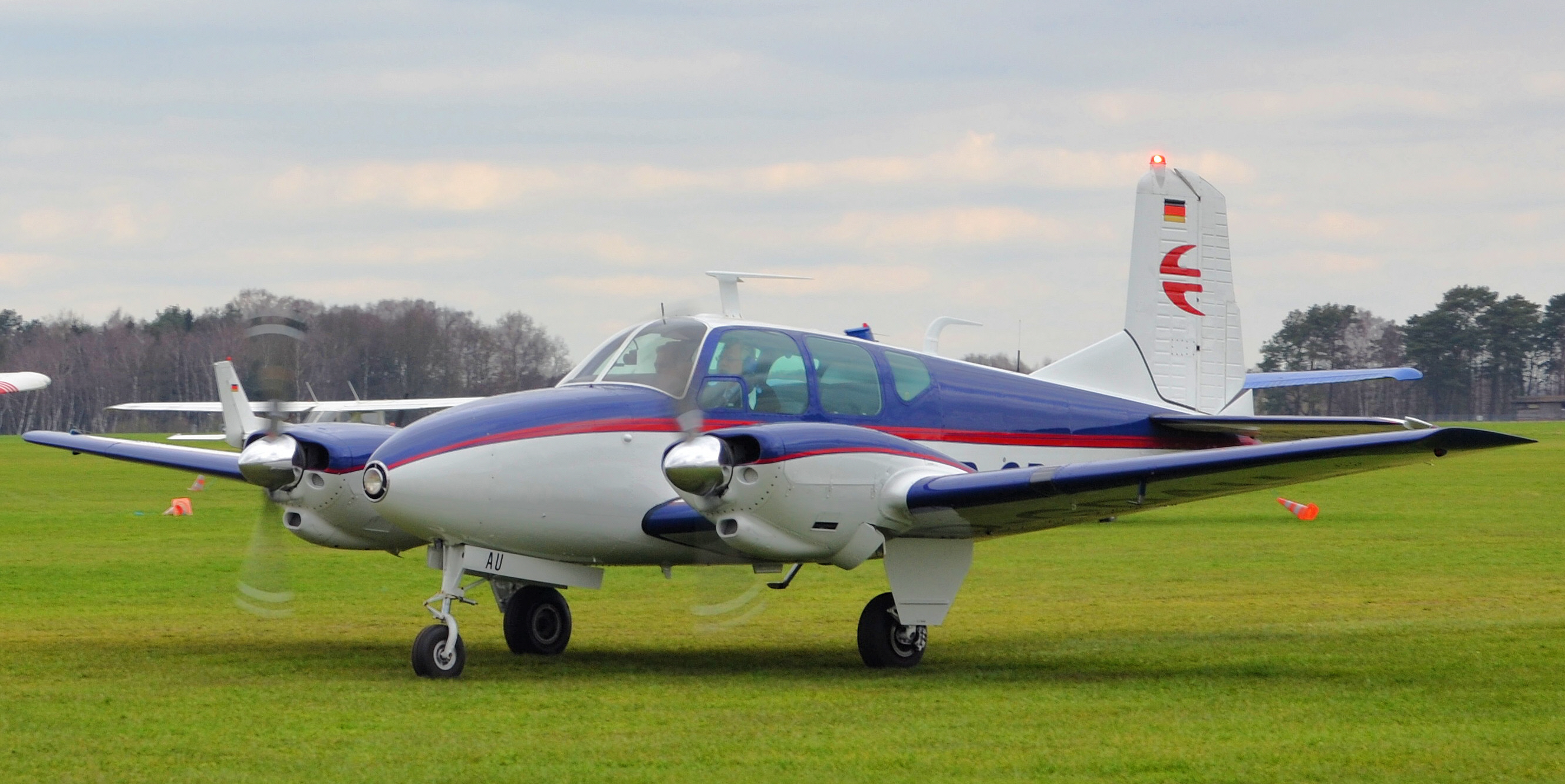 Ur-Modell Beechcraft BE95 Travel Air (D-GDAU) von 1959 auf dem Flugplatz Uetersen